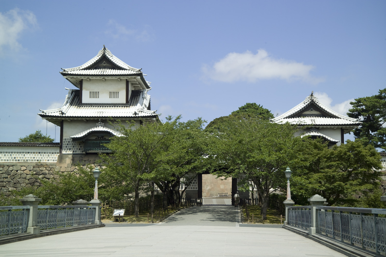 Kanazawa Castle, Kanazawa, Ishikawa Prefecture, Japan Ishikawa Gate